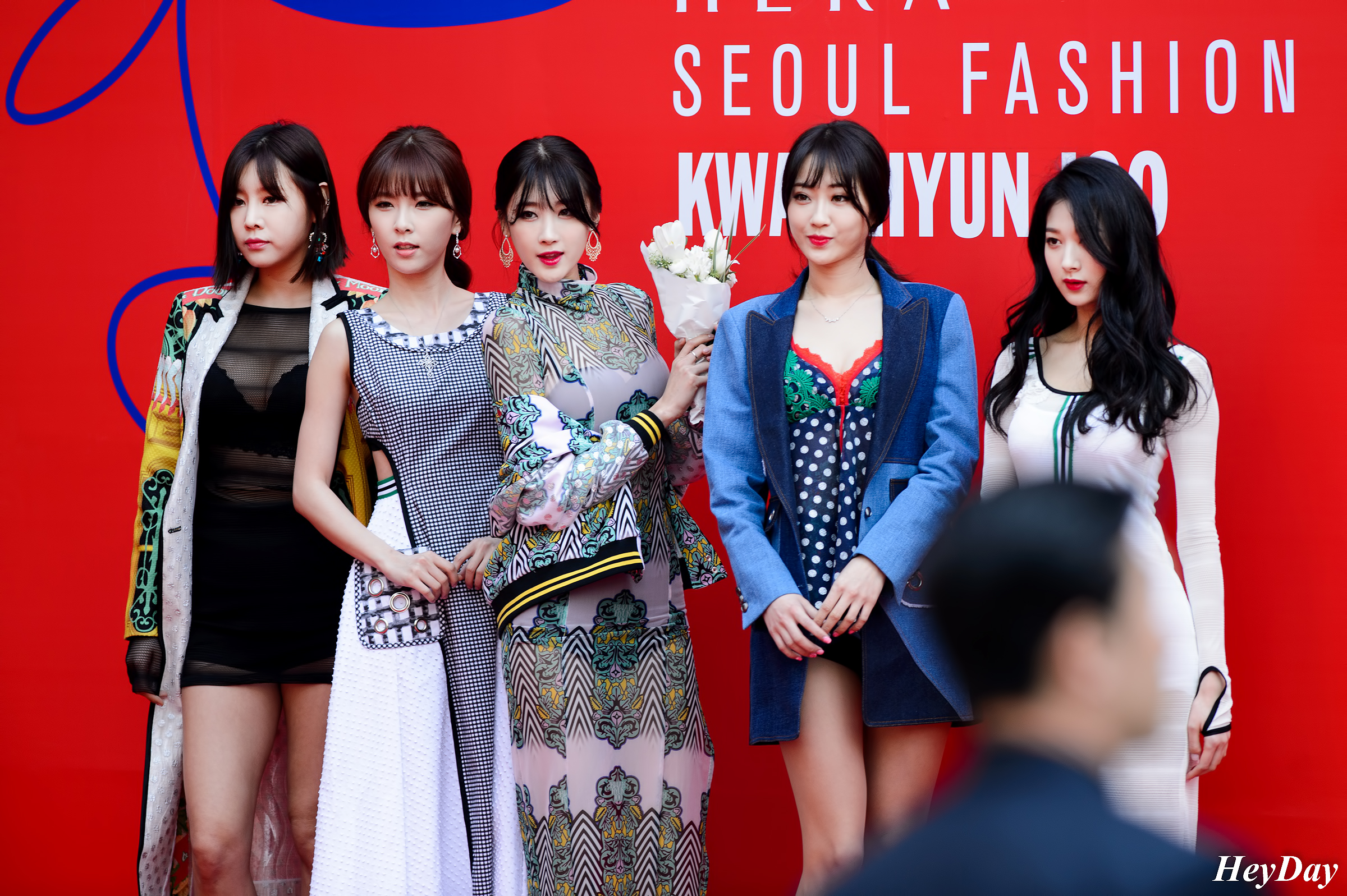 160326 2016 F/W 서울패션위크 레드카펫 - 나인뮤지스